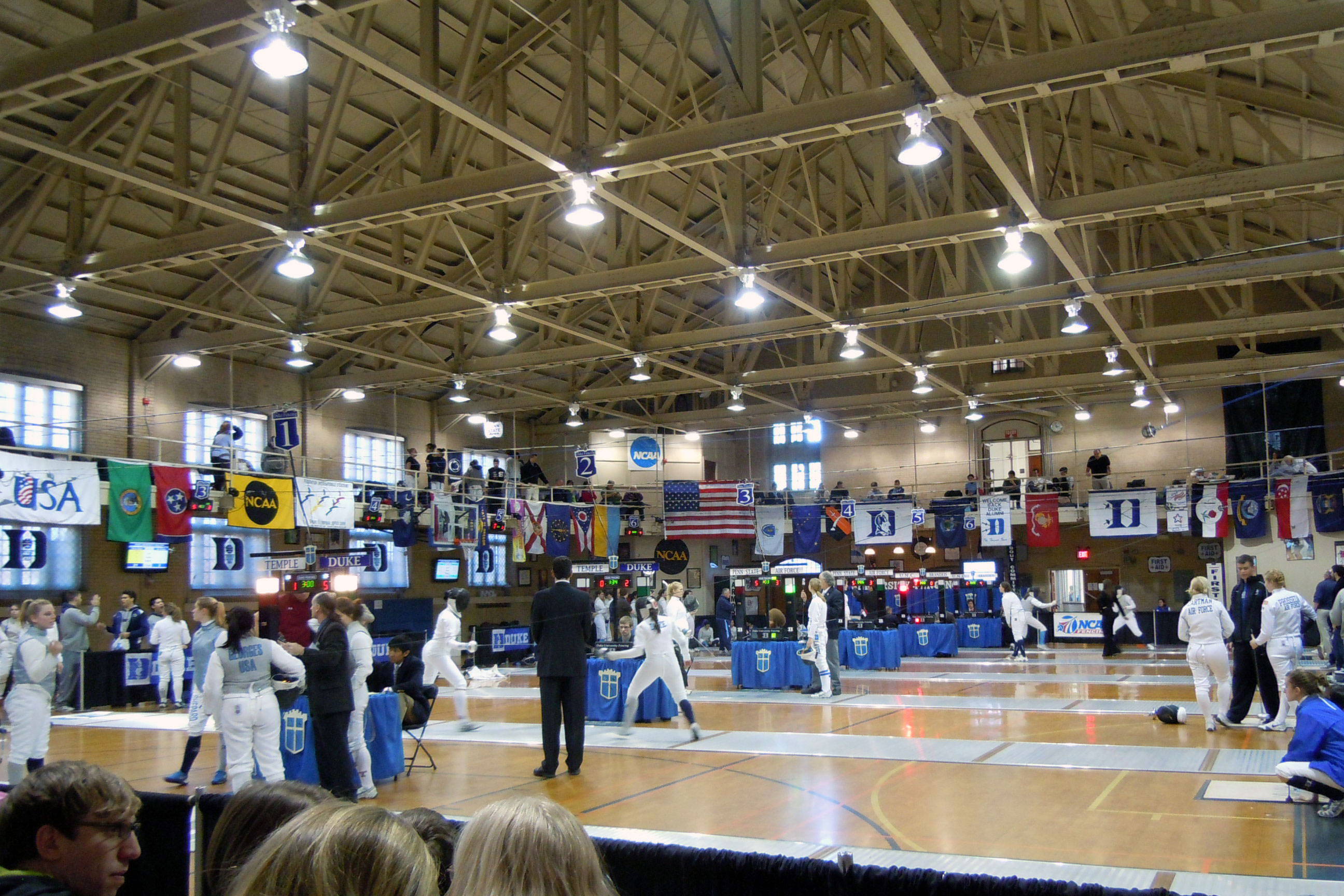 Duke Fencing meet.